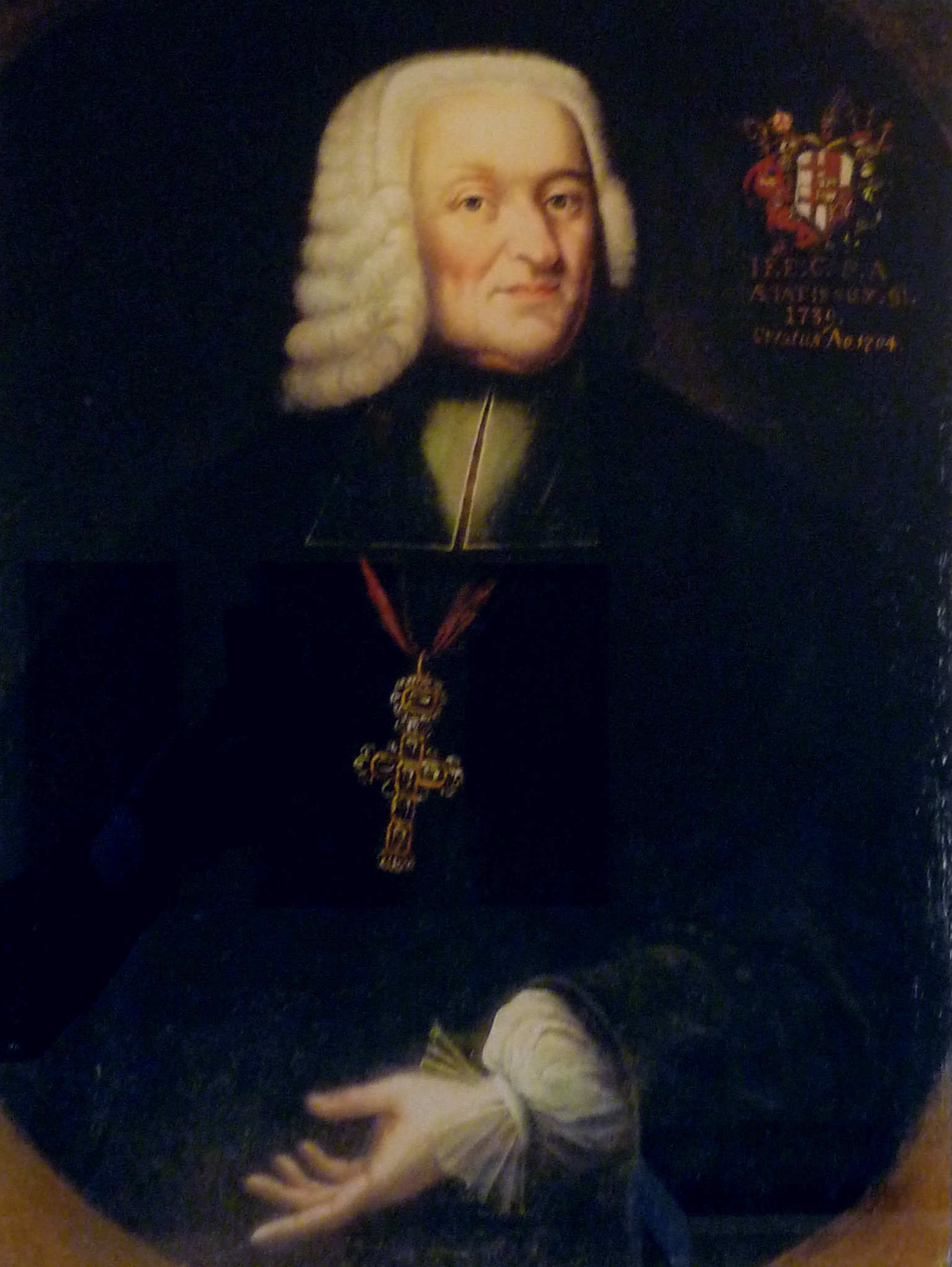 Portrait of Johann Franz Schenk von Stauffenberg (1658-1740), Bischof von Konstanz